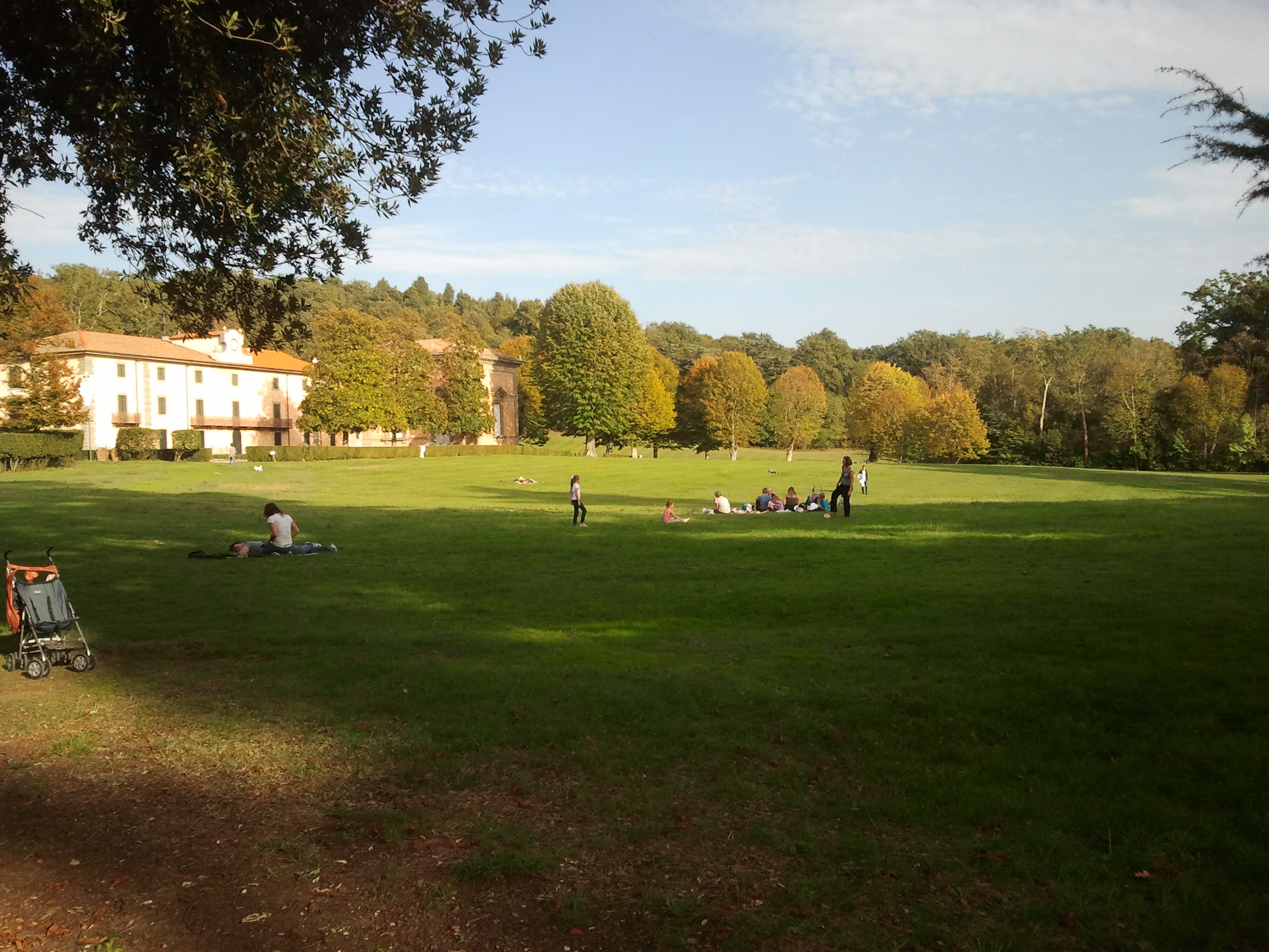 Parco Villa Demidoff (Pratolino) SAMSUNG